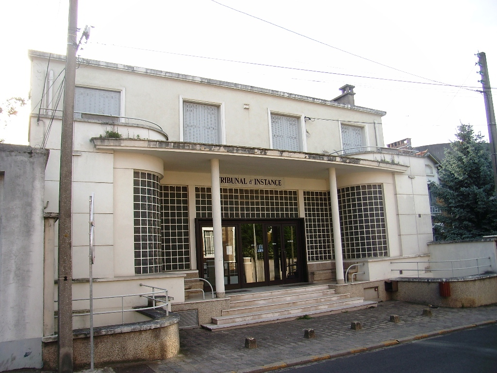 Anciens bains-douches d'Arpajon (91) aujourd'hui Tribunal d'Instance